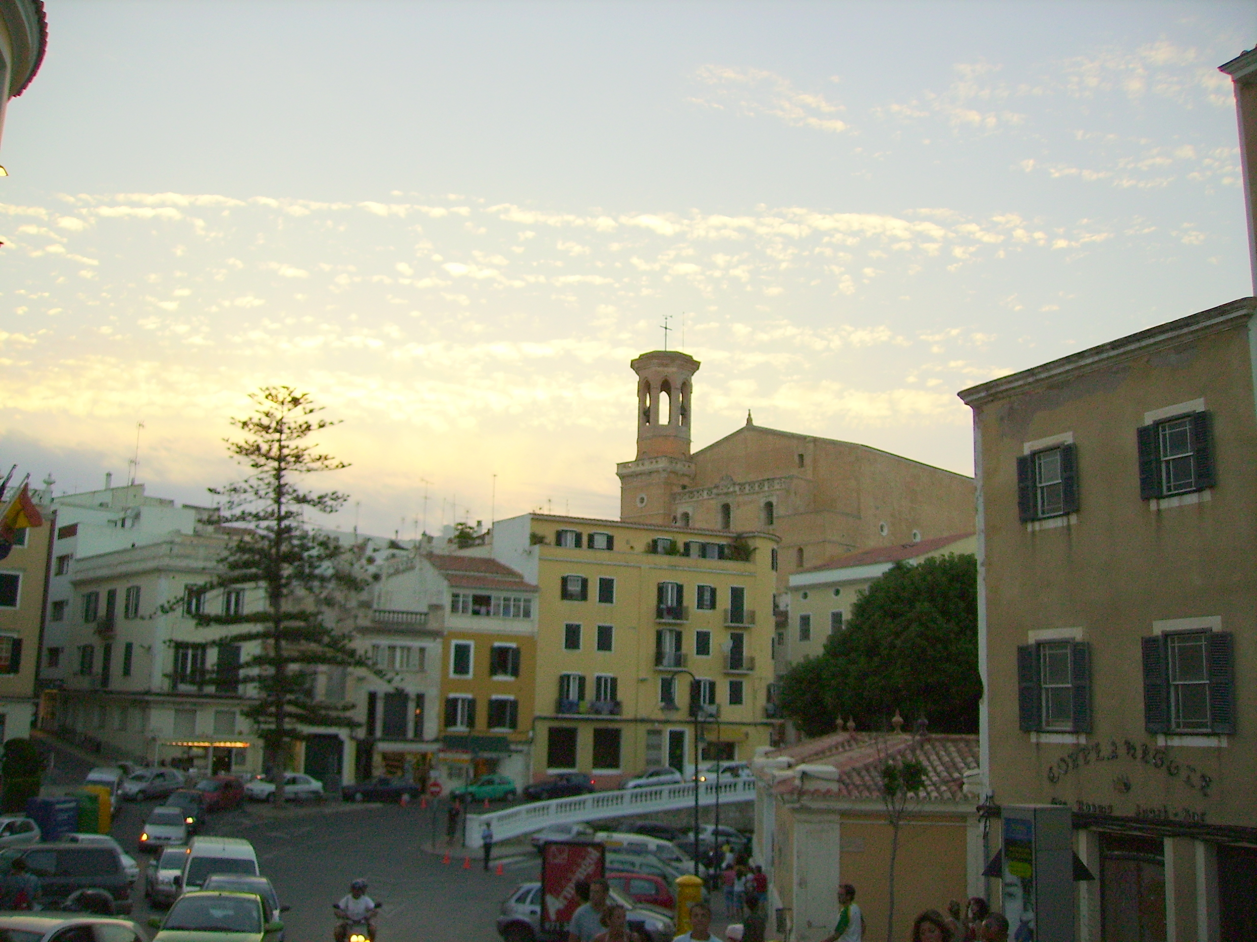 Maó, Menorca, Illes Balears.